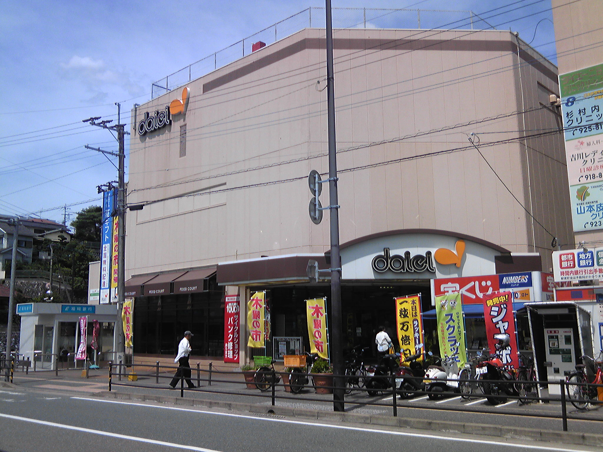 ダイエー二日市店・西鉄二日市駅東口側入口（福岡県筑紫野市）